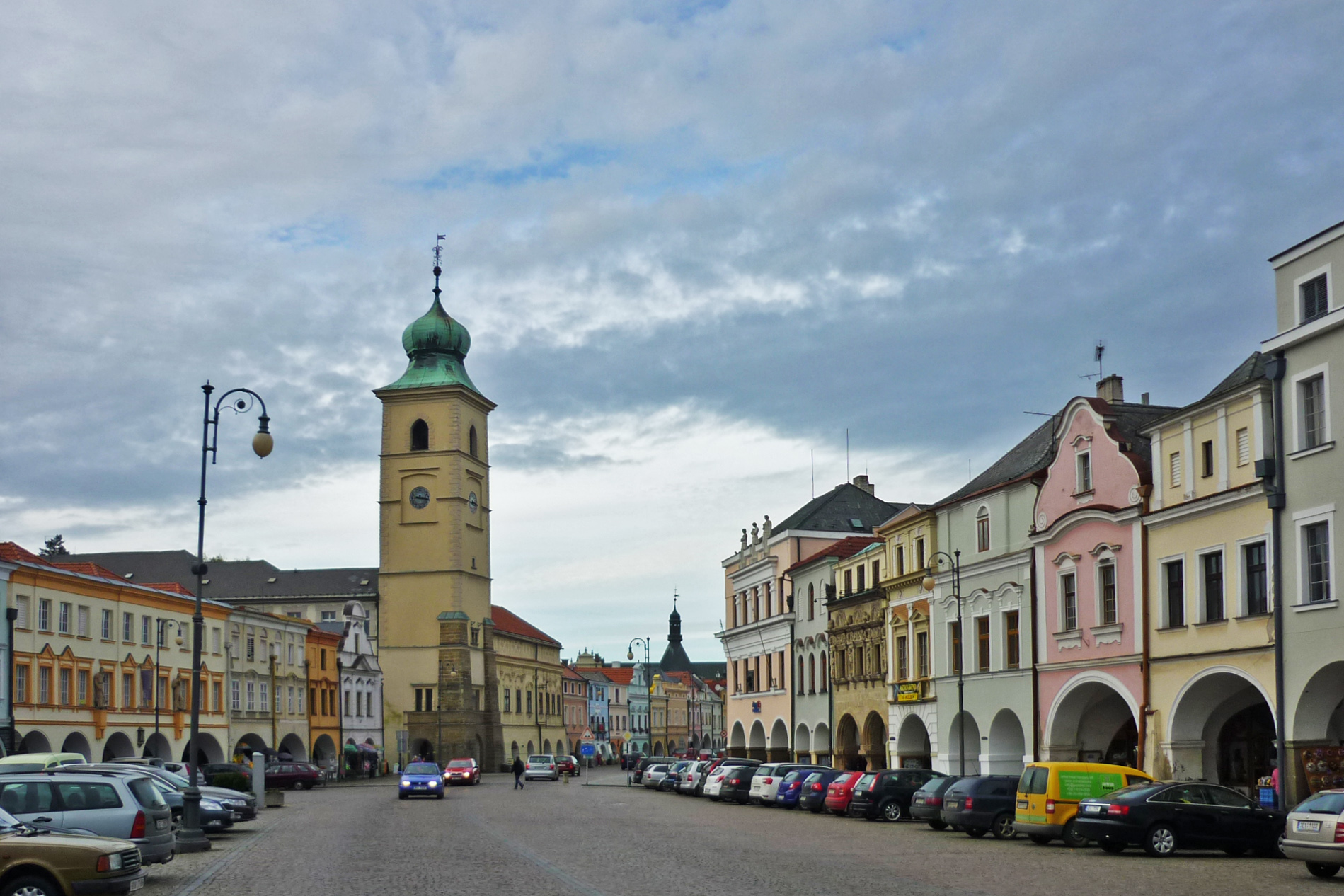 Häuser am Ring in Leitomischl (Smetanovo náměstí in Litomyšl)